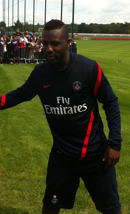 Siaka Tiéné au Camp des Loges